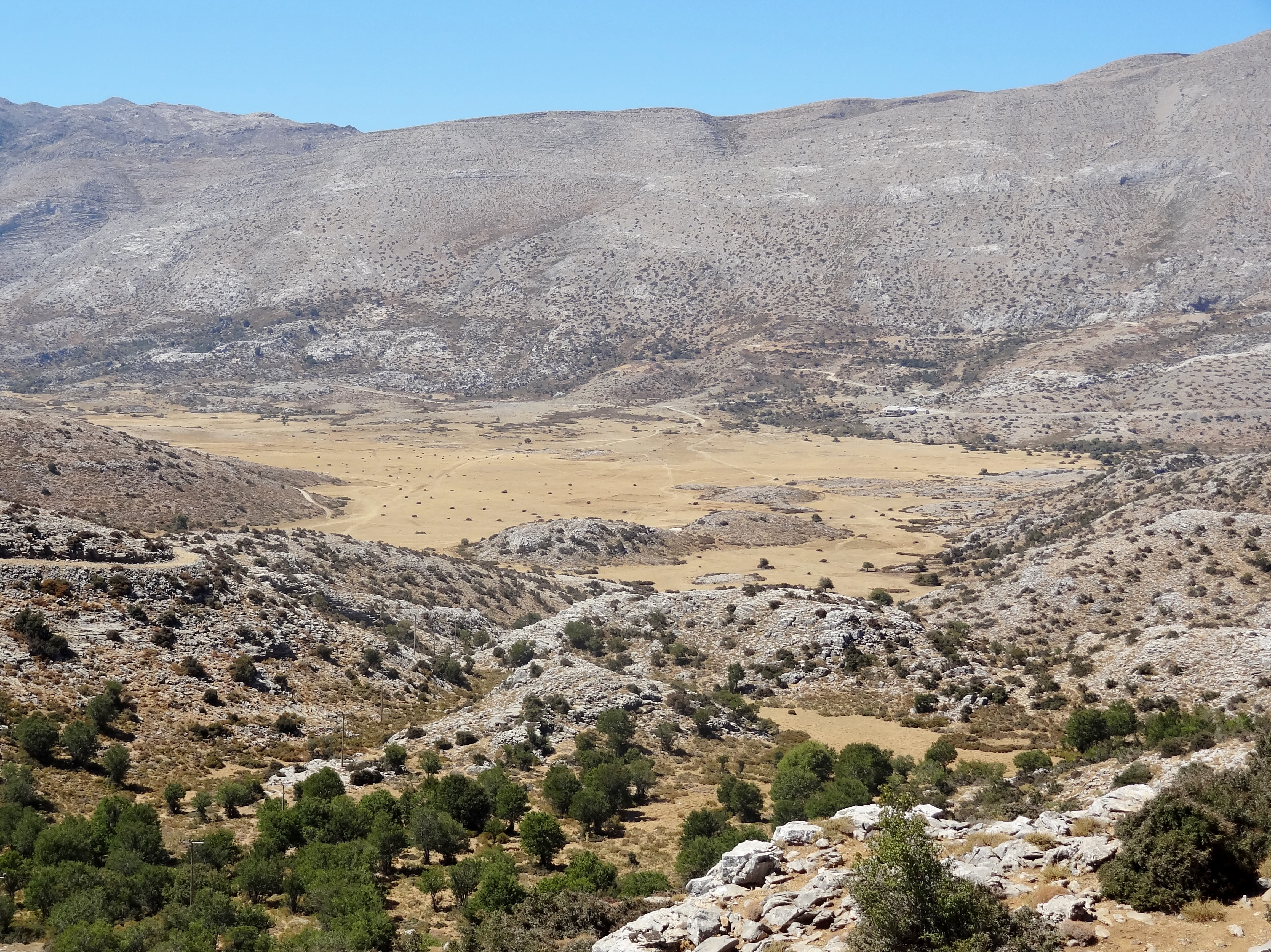 Nida-Hochebene, Gemeinde Anogia, Regionalbezirk Rethymno, Kreta, Griechenland